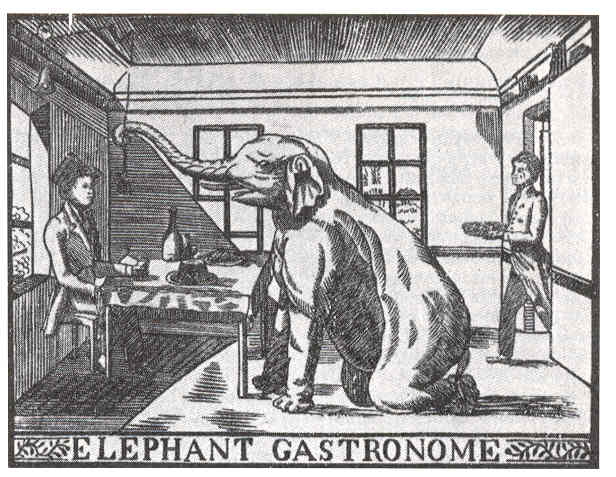 Elefant Baba der Madame Lecerf (1824)